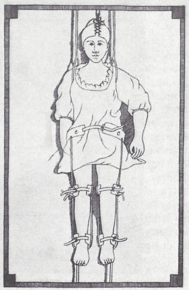 Zeichnung einer Skoliose-Patientin im Streckbett nach Jean-André Venel.